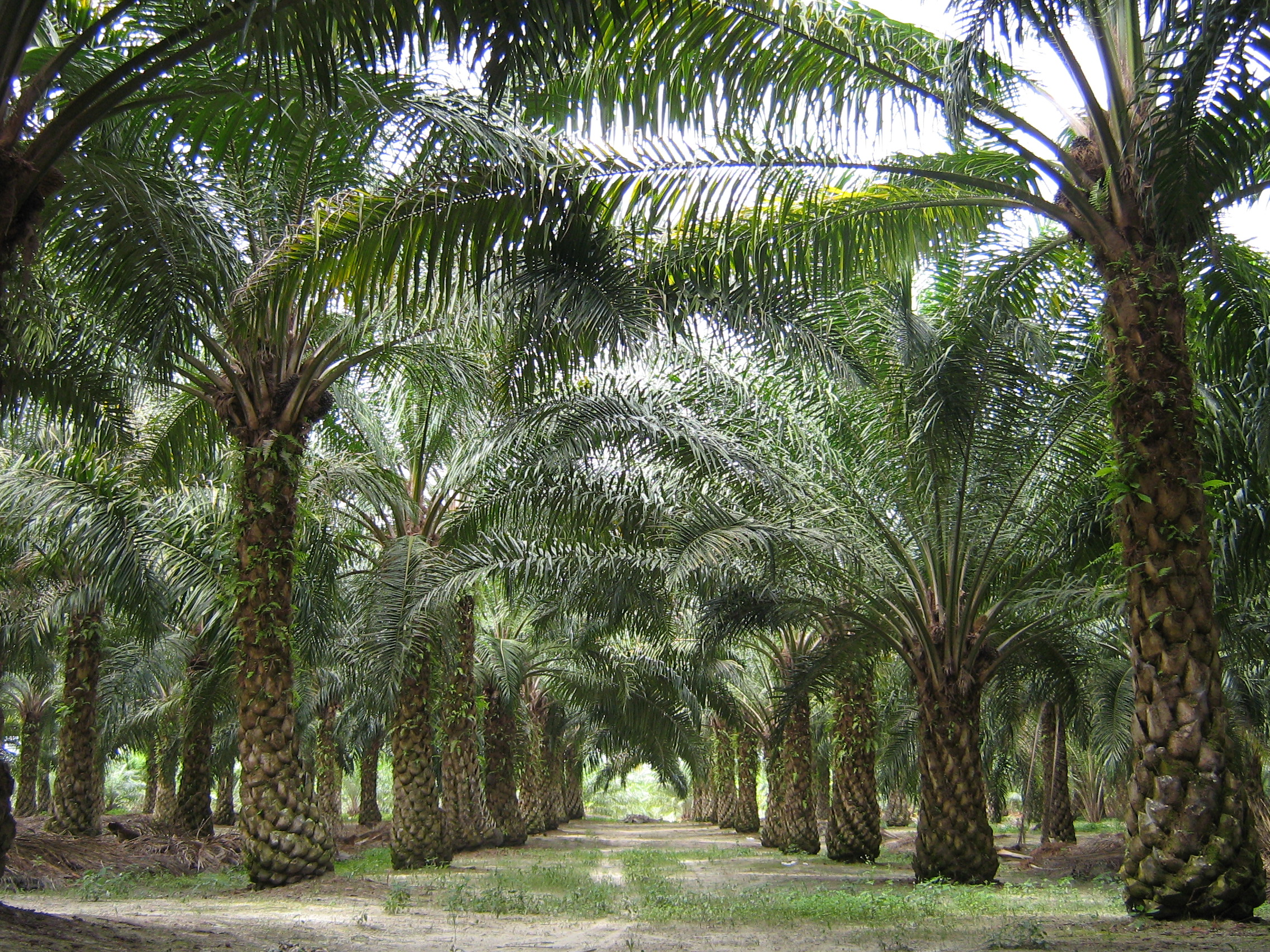 oil palms in malaysia